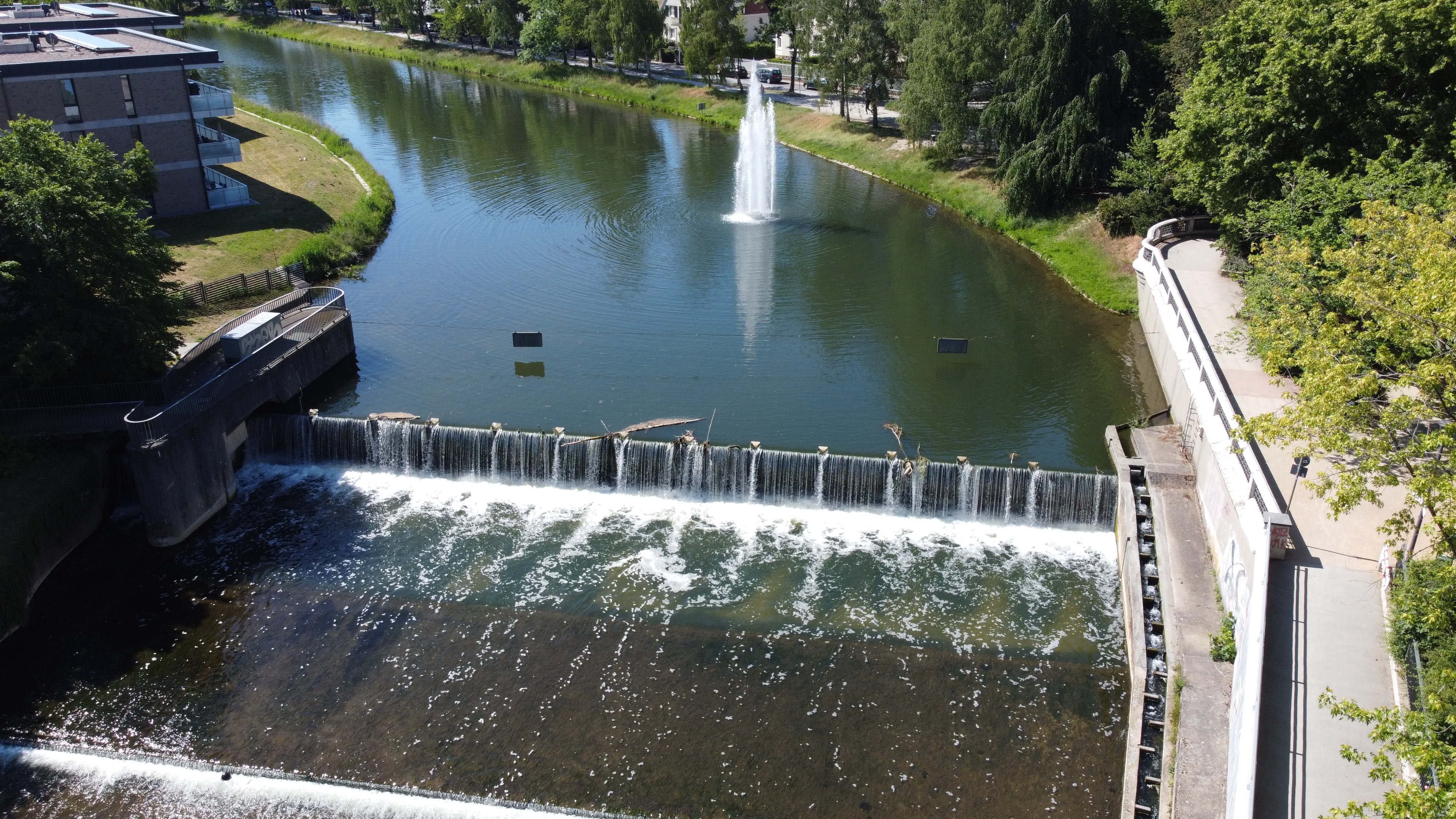 Bergertor Herford Luftbild